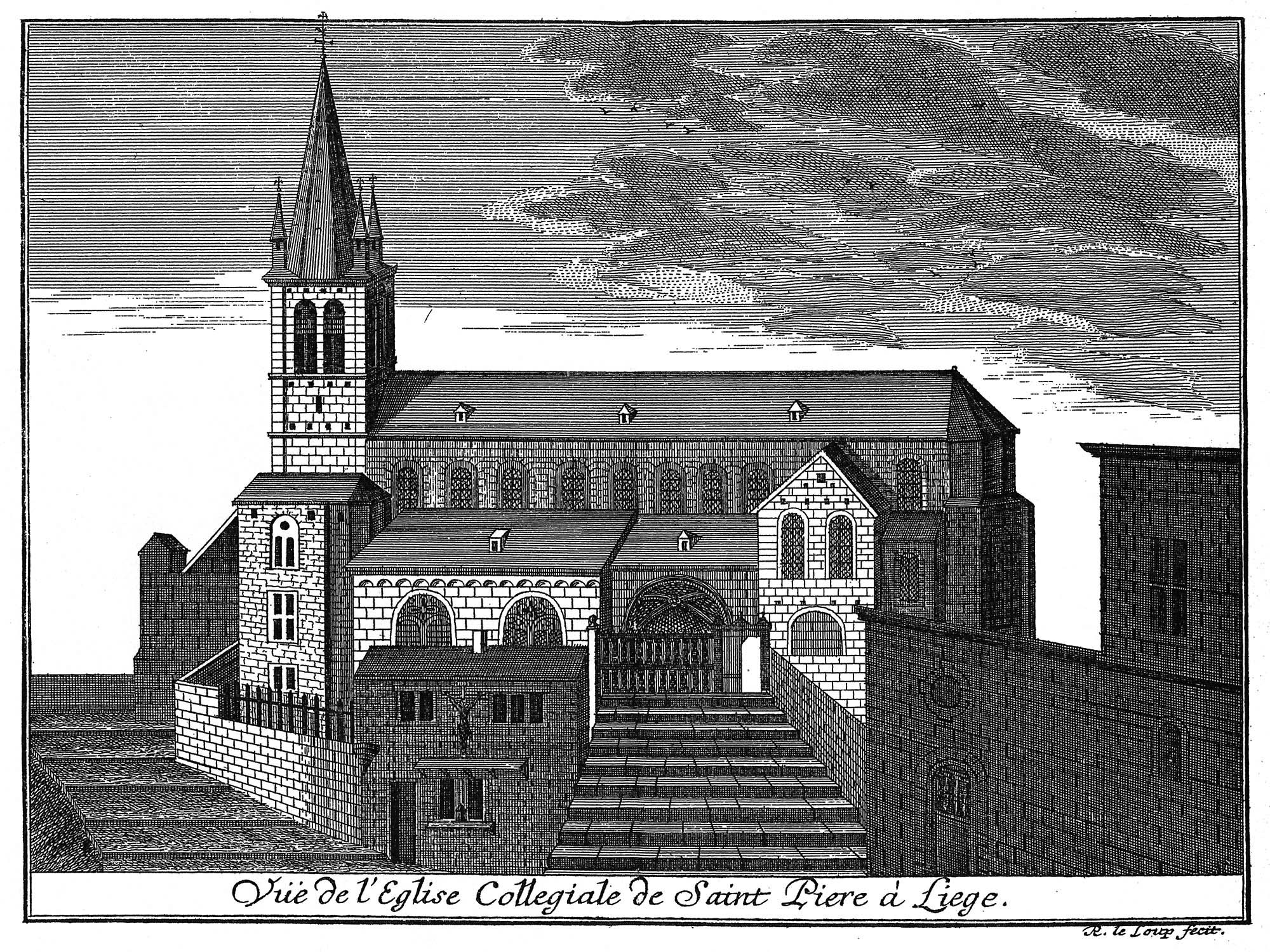 Vue de la collégiale Saint-Pierre à Liège (gravure de Remacle Le Loup, XVIIIe siècle)